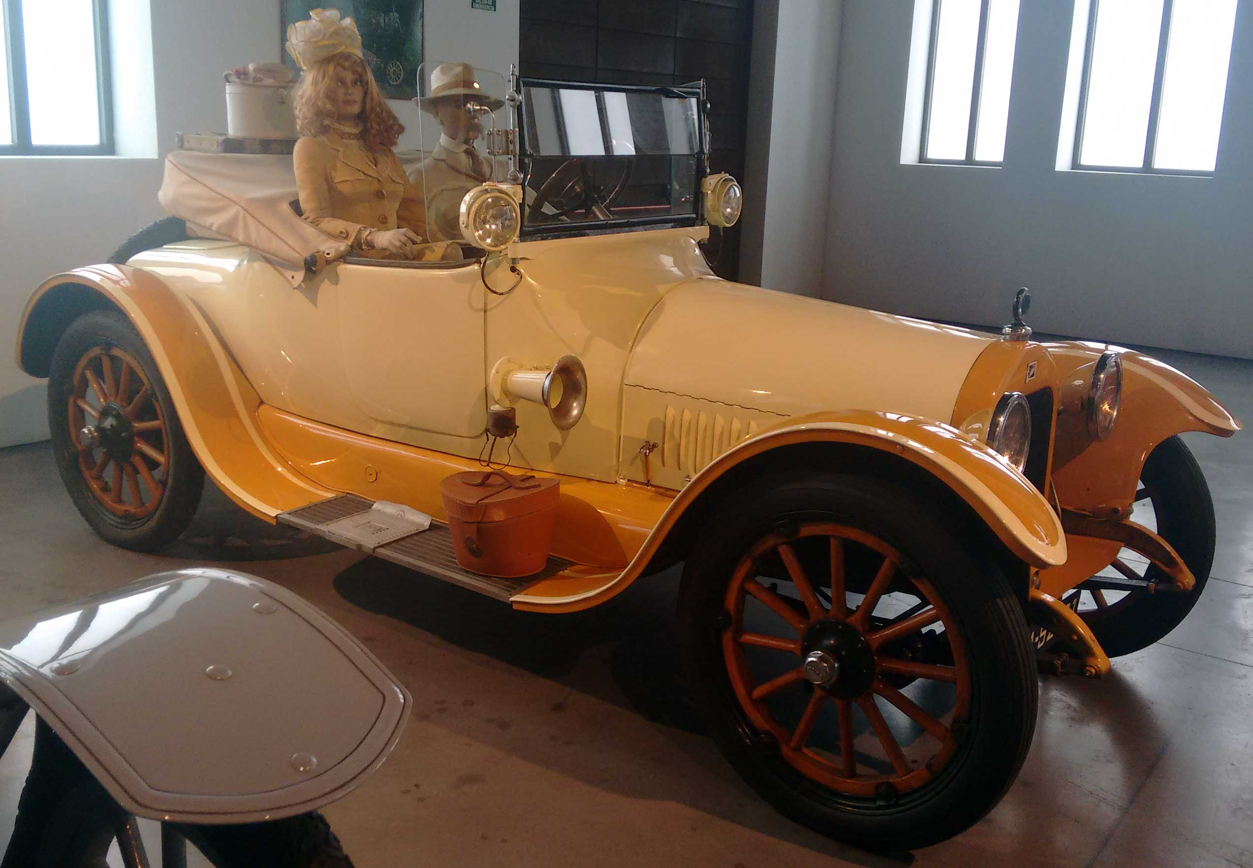 Buick de 1916, 6 cilindros 23 HP y 3700 centímetros cúbicos. Se encuentra en el museo del automóvil de Málaga.